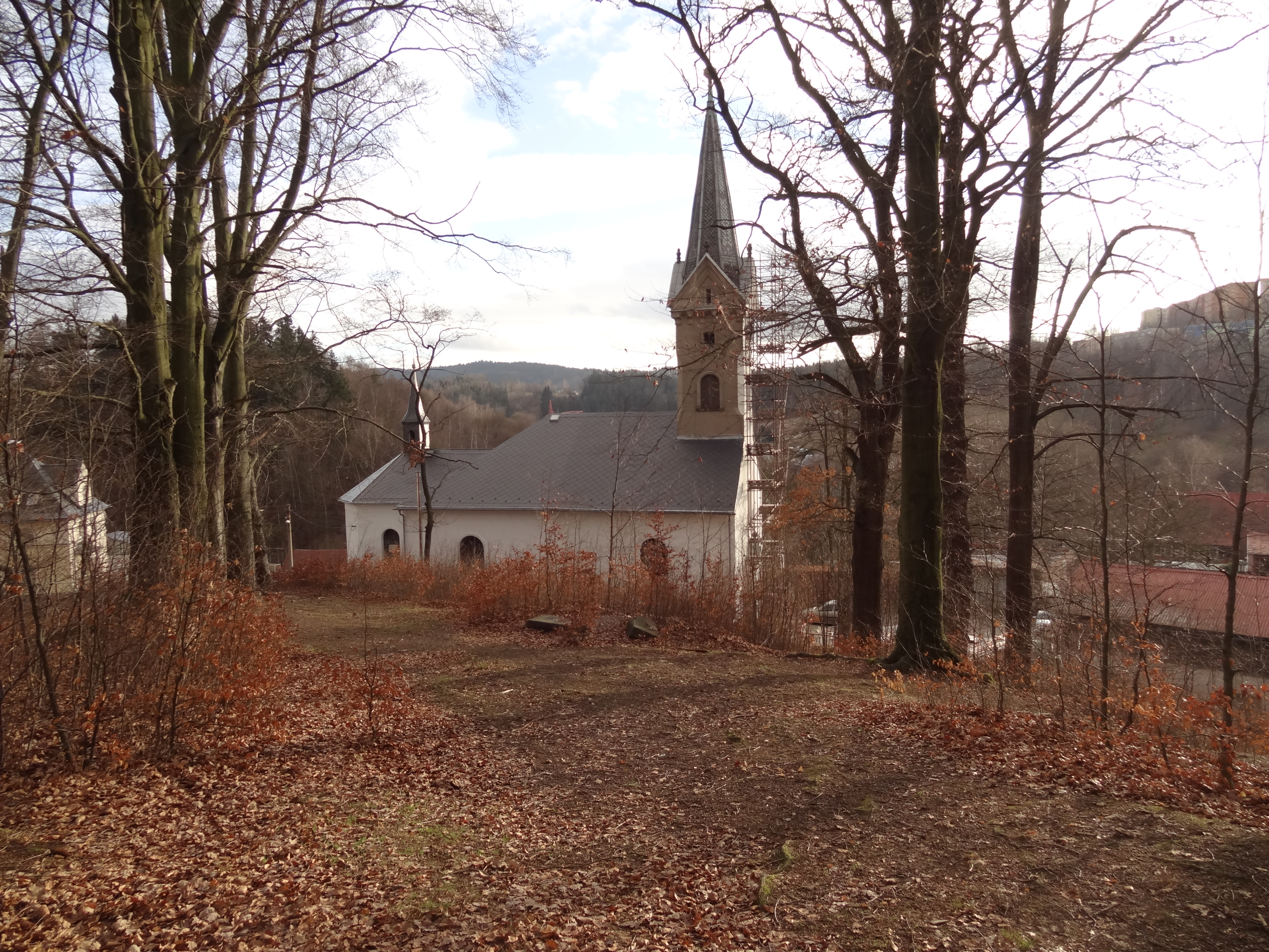 Liberec-Starý Harcov - bývalý hřbitov